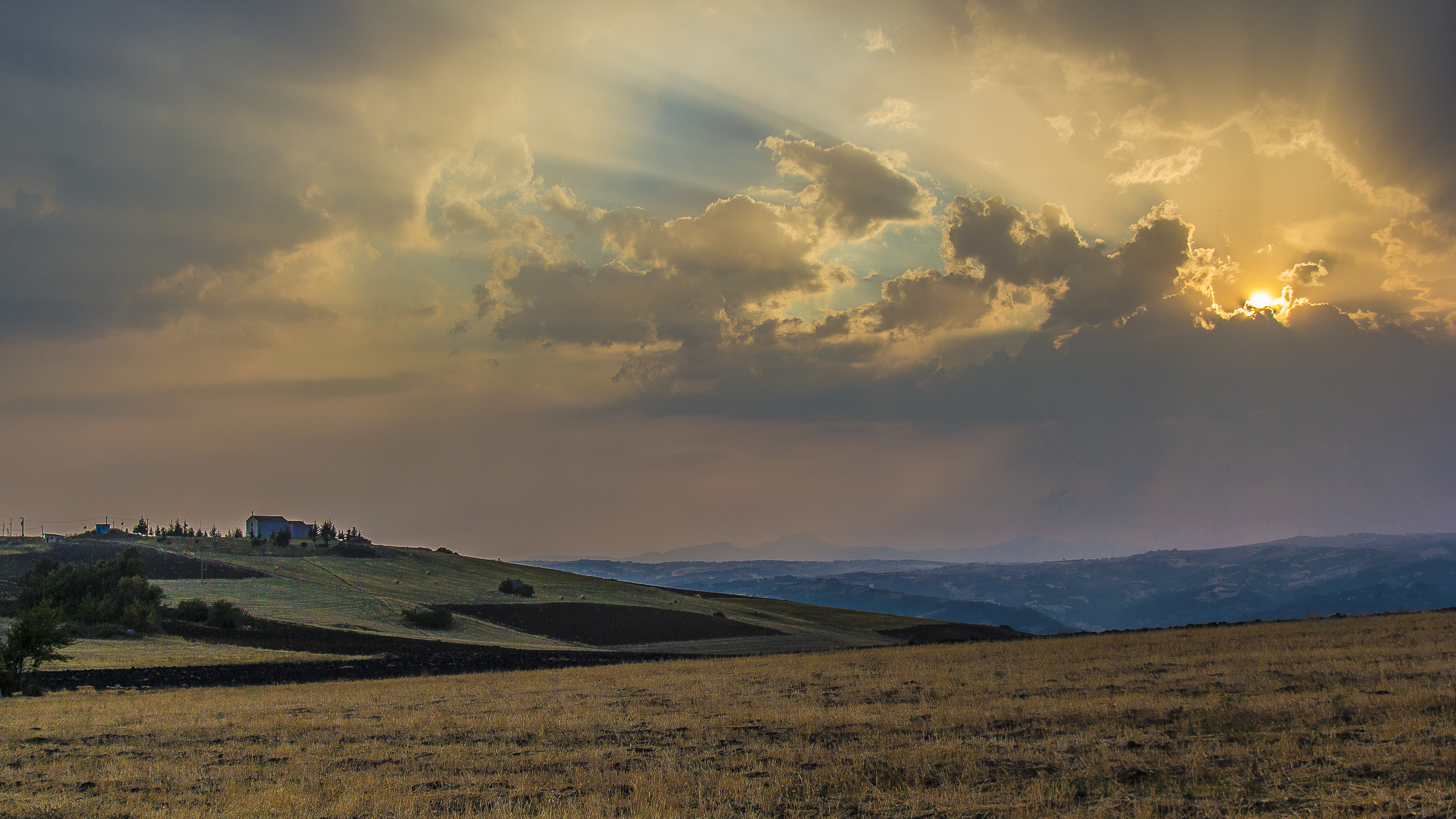 Chiesa dell'incoronata